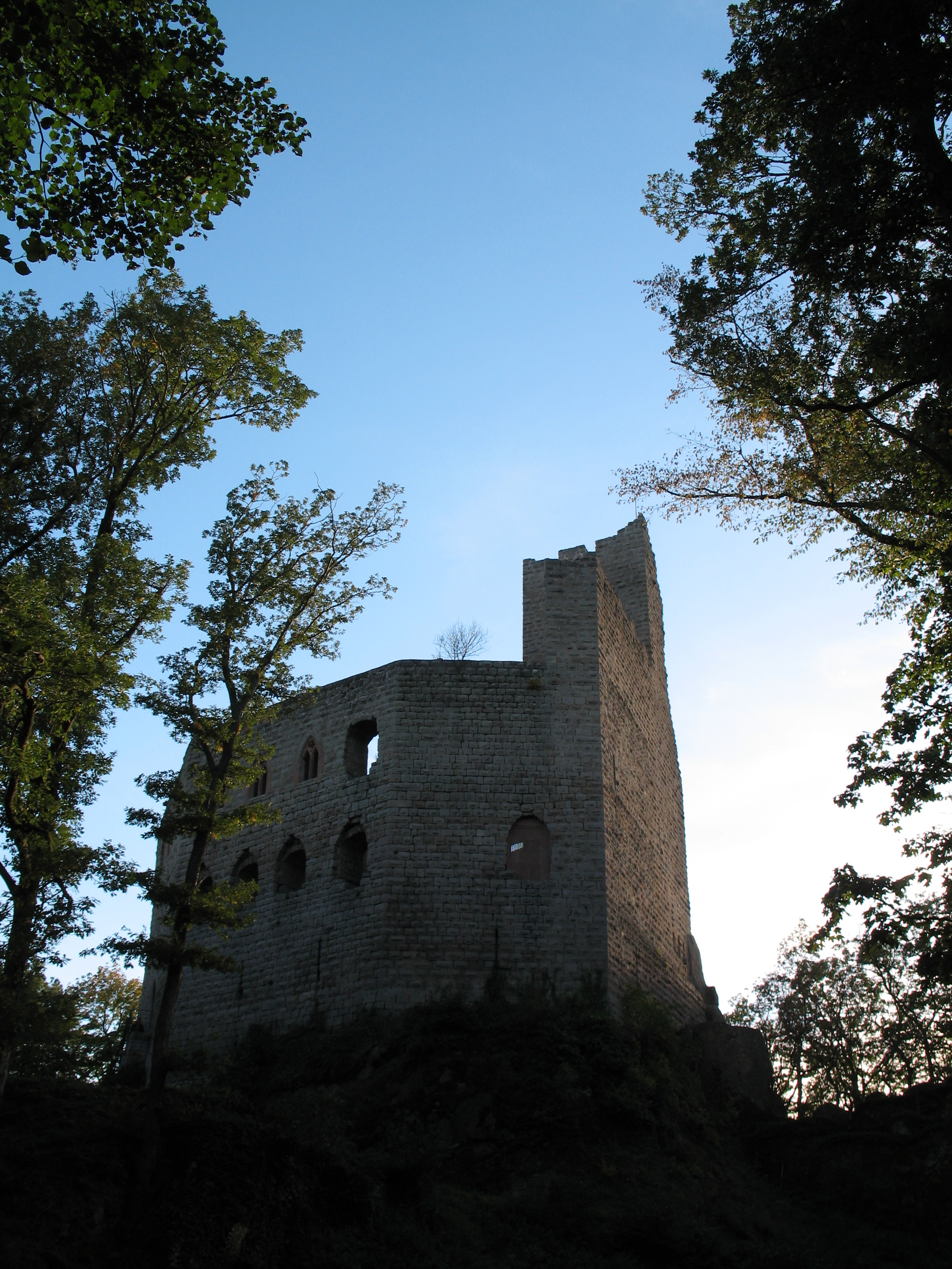 Château de Spesbourg